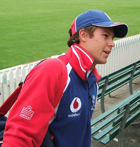 Geraint Jones at Adelaide Oval